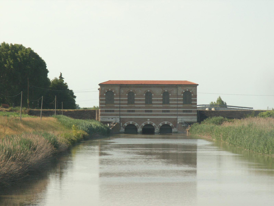 Bonifica Parmigiana Moglia - La Botte San Prospero